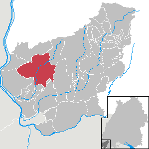 Kandern, Landkreis Lörrach, Baden-Württemberg